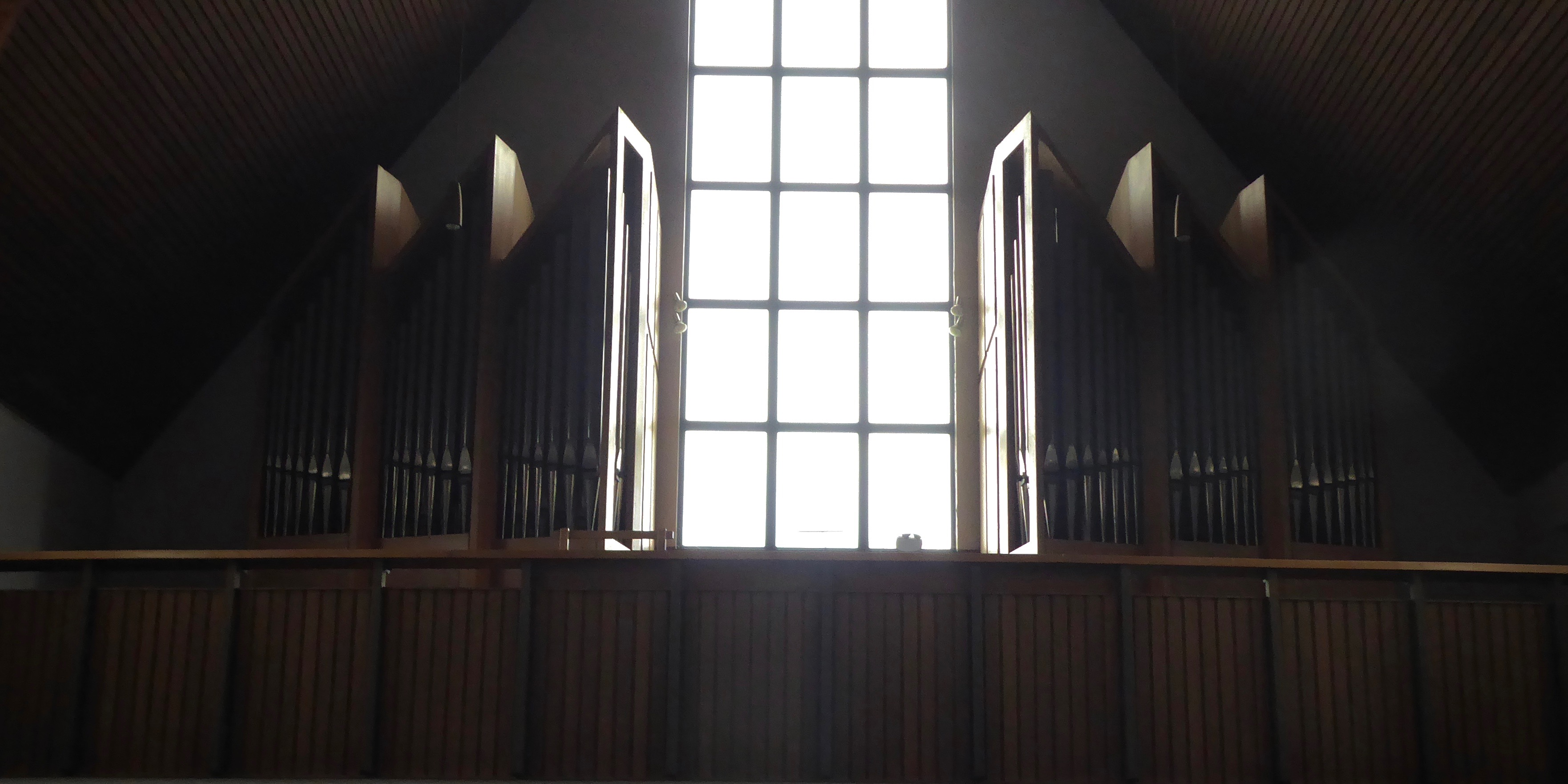 Orgel der St.-Marienkirche